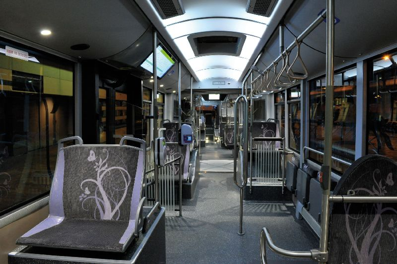 18 hybrid metrostyle